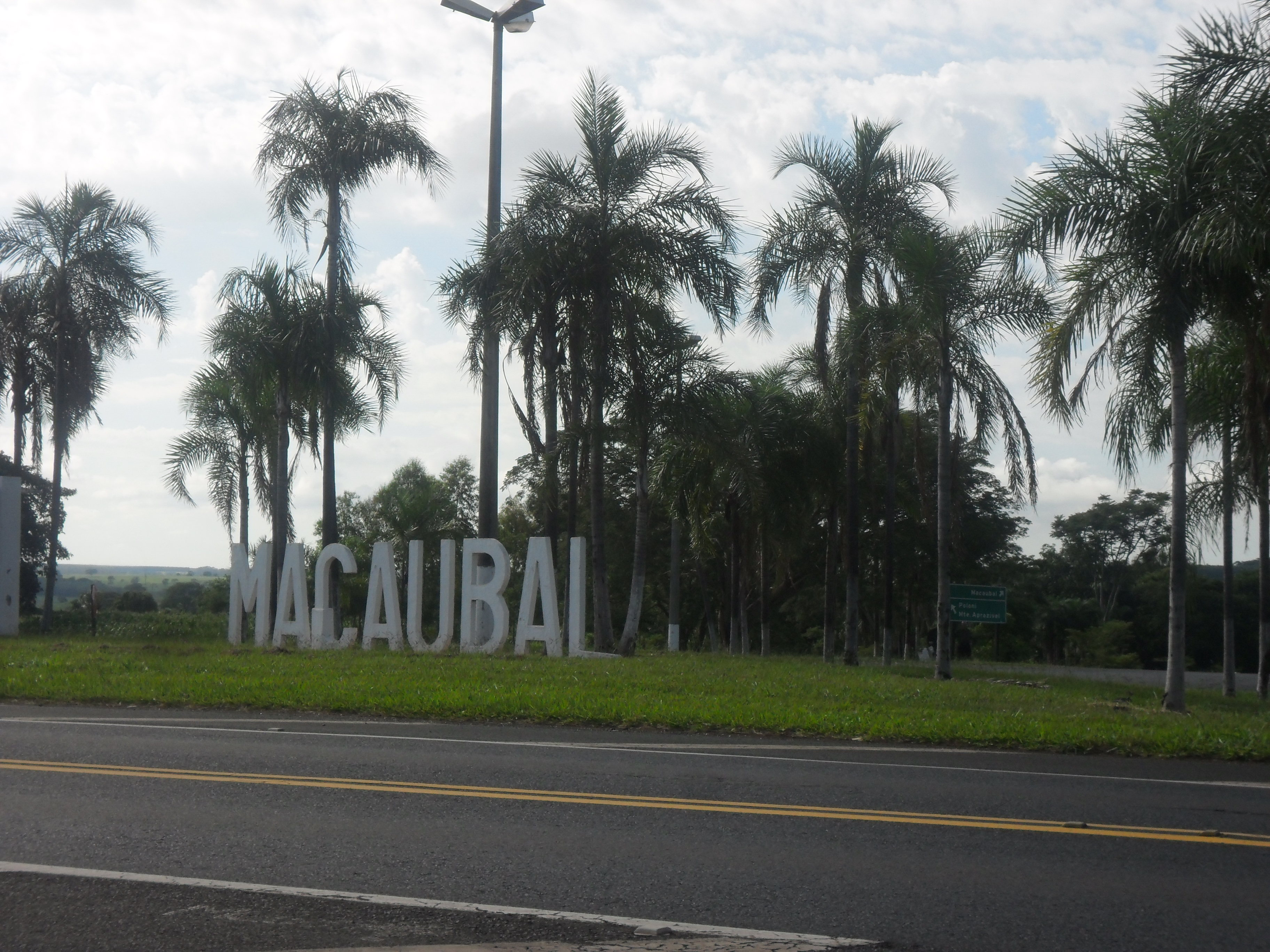 Trevo de entrada para Macaubal - SP